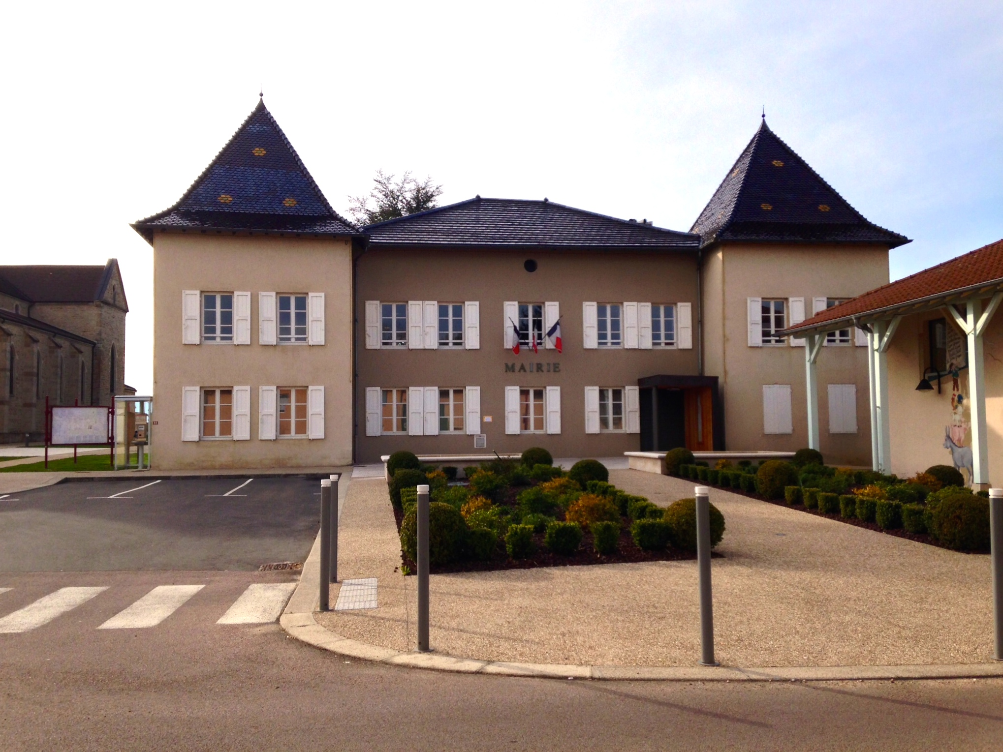 Mairie de la commune de Grièges